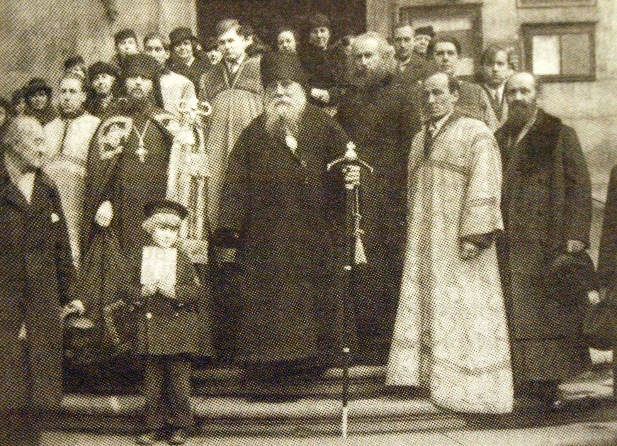 Biskup Sergij, svěcení archimandrity Isaakije